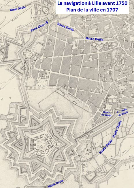 Travail personnel d'après Plan de la ville et des environs de Lille : 9e époque, en 1708 / par Brun-Lavainne ; dessiné sur pierre par Duhem cadet - 1833 Auteur L. Danel ( Lille ). Lithographe Sujet Lille -- 1708 Éditeur L. Danel ( Lille ) Gallica Bibliothèque nationale de France